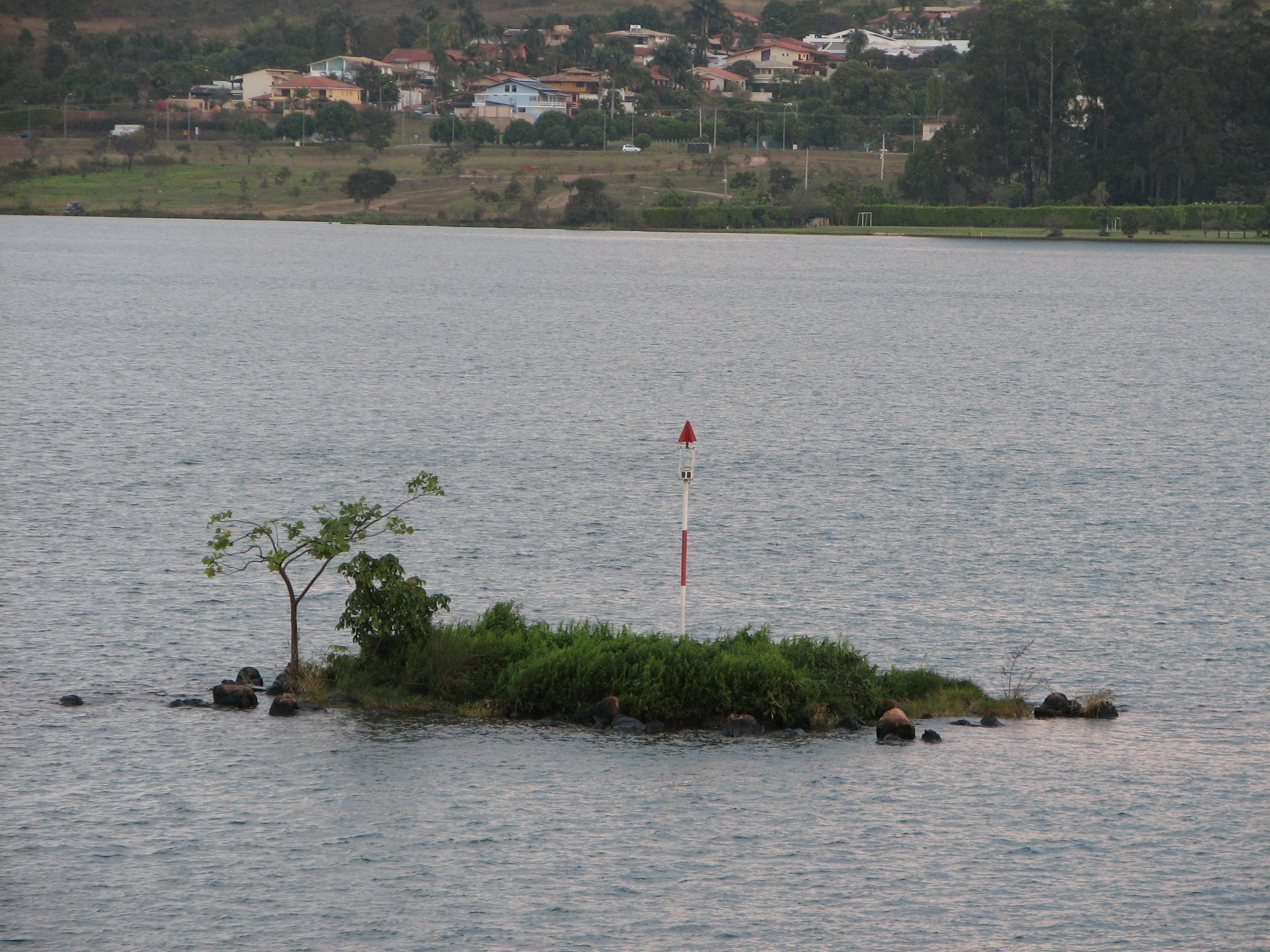 Ilha dos Clubes, Brasília, Brasil.